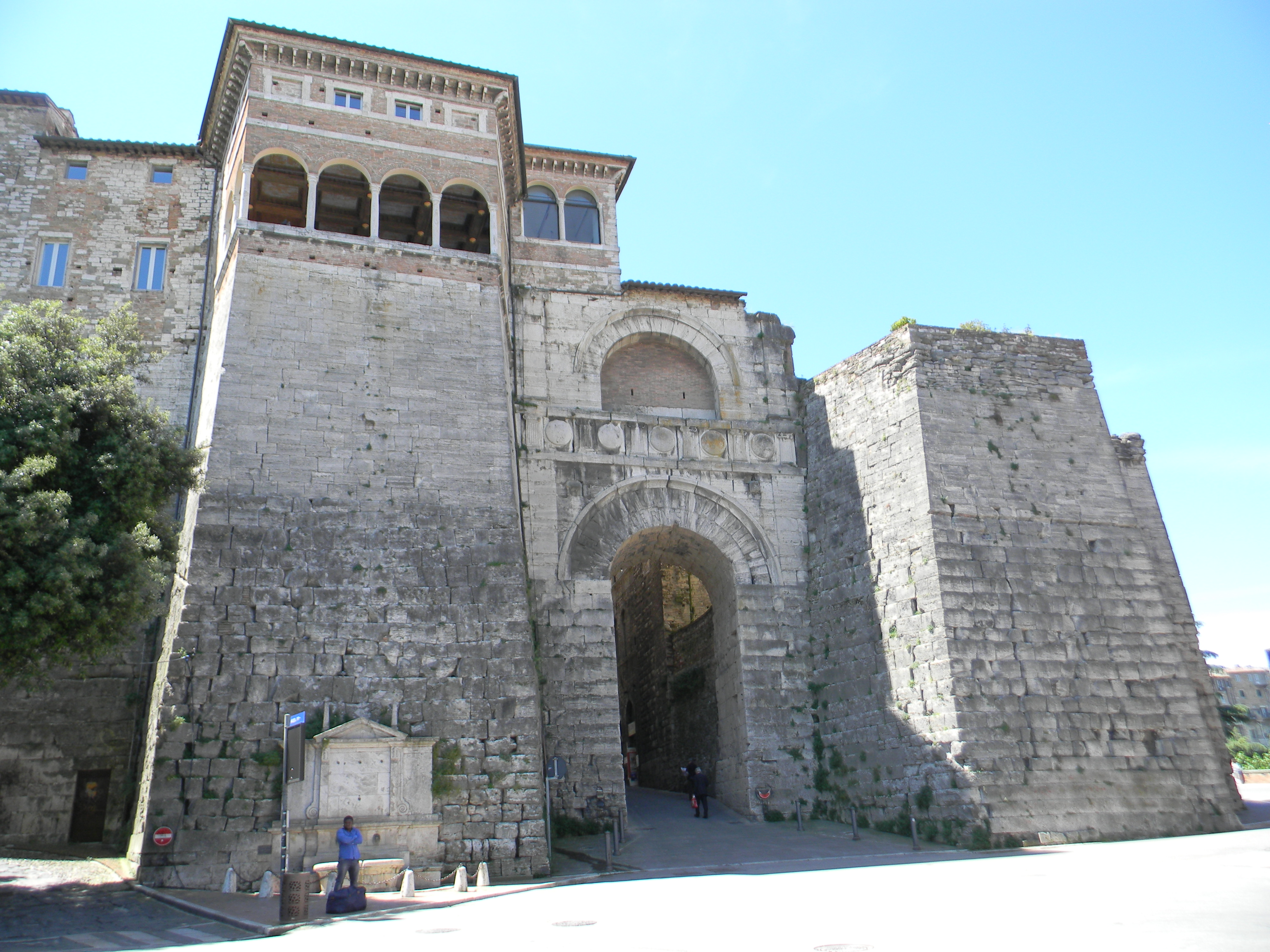 Arco Etrusco This is a photo of a monument which is part of cultural heritage of Italy.